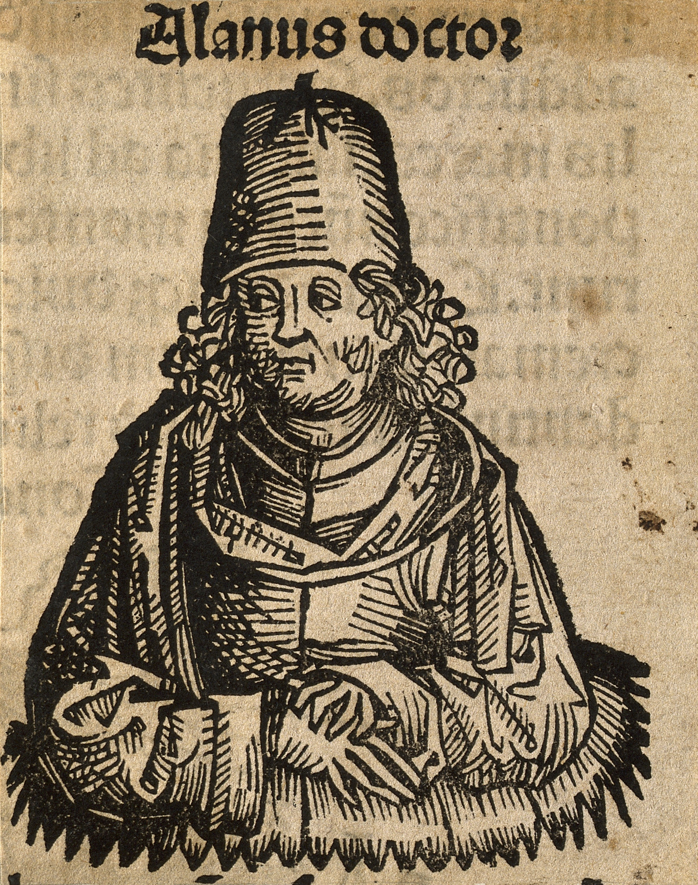 Alanus de Insulis (Alain de Lille). Woodcut. Iconographic Collections Keywords: alanus de insulis [alain de li; portrait prints; Alanus de Insulis; woodcuts